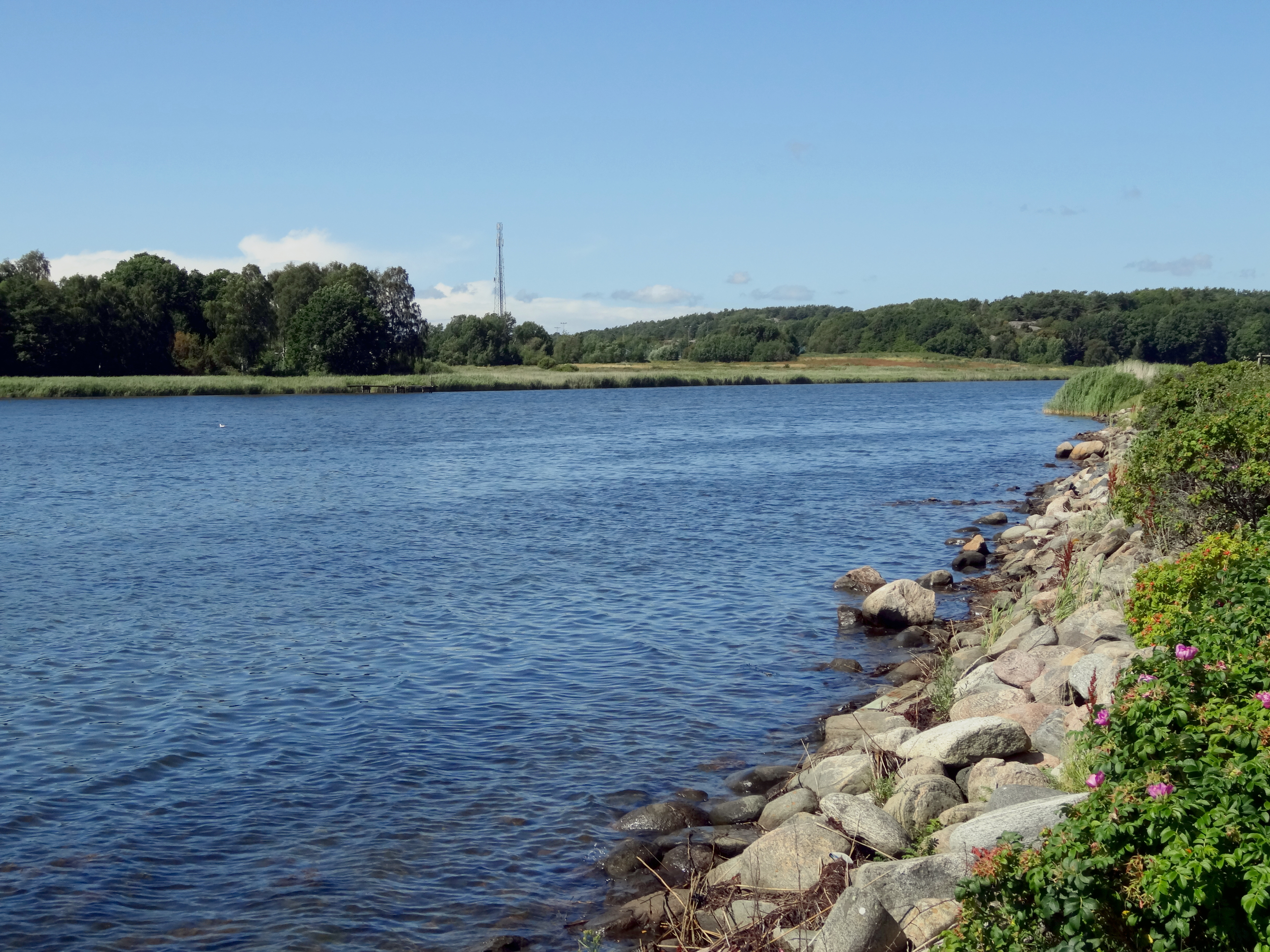 Askimsviken. Vy nordvästerut från Hagkroksvägen i Göteborg.